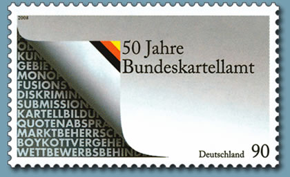 Briefmarke der Deutschen Post AG mit dem Motiv 50 Jahre Bundeskartellamt